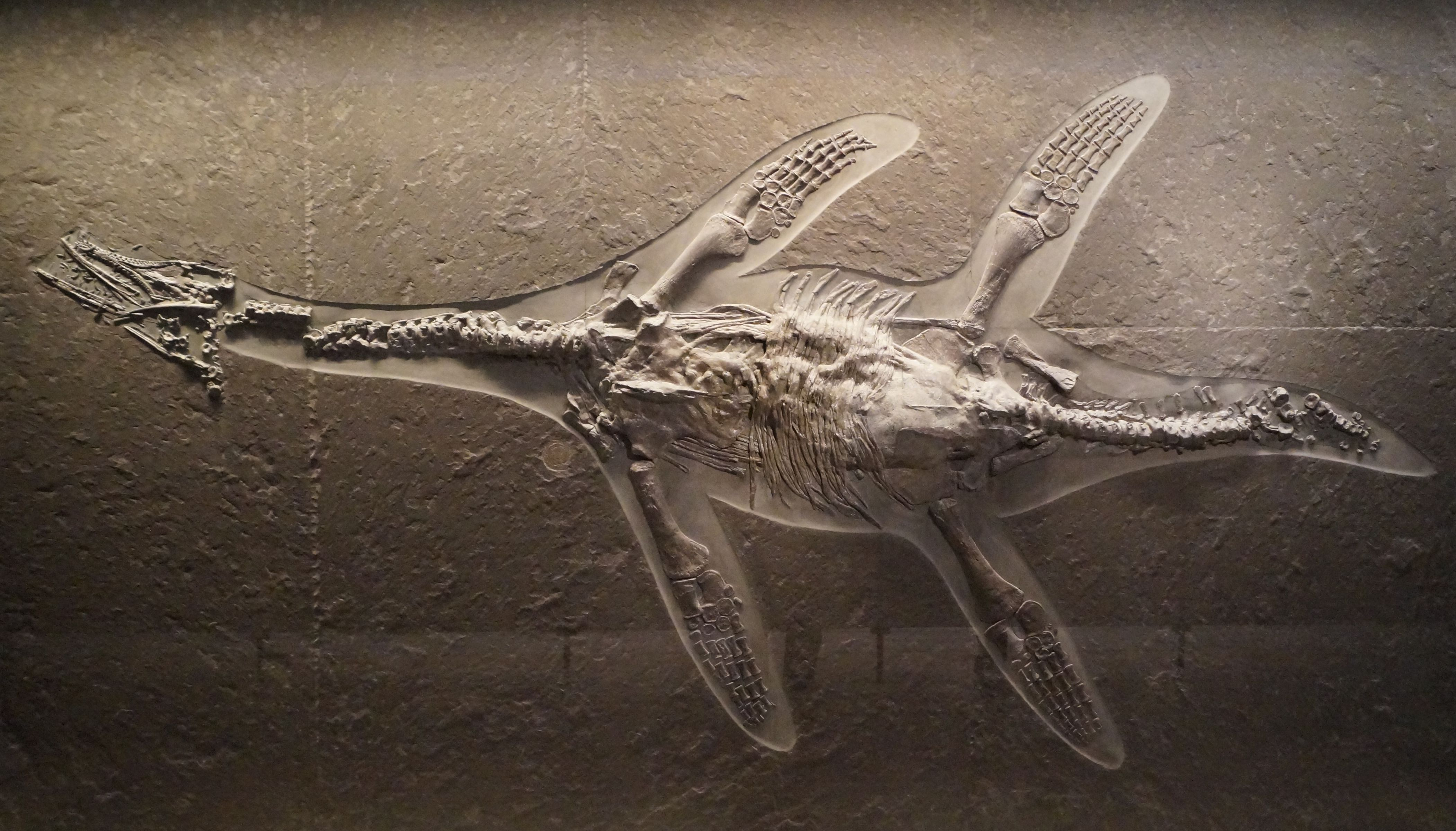 Ausstellungsstück(e) im Urwelt-Museum Hauff, das Fossilien aus der Formation des Posidonienschiefers der Schwäbischen Alb zeigt